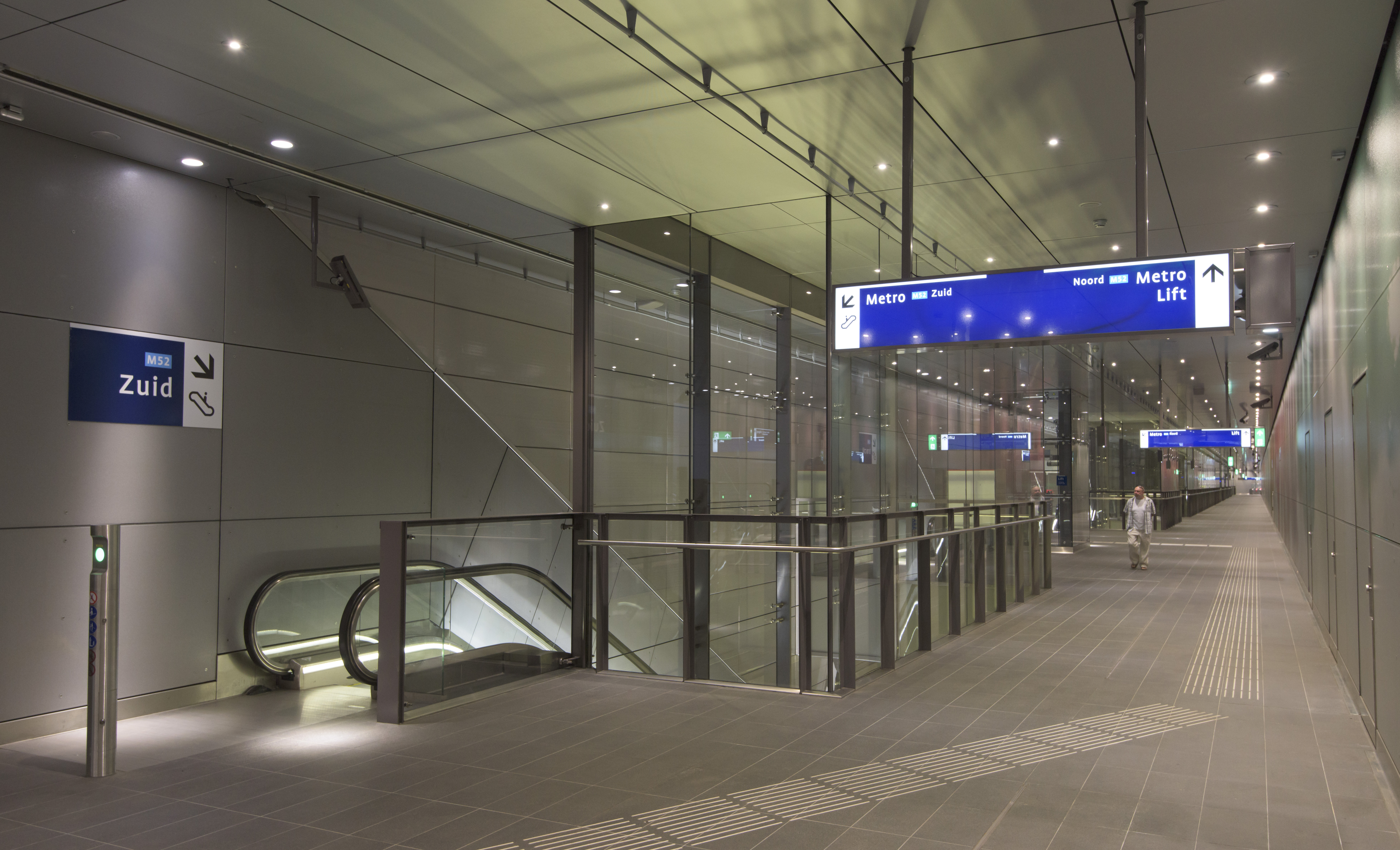 Metrostation De Pijp